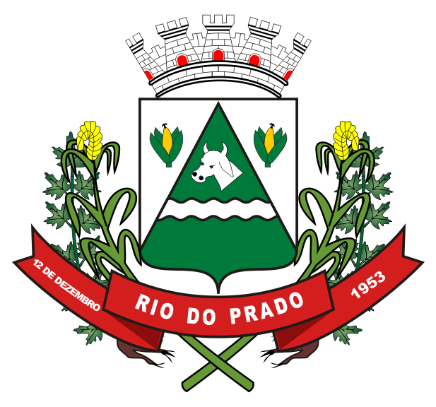 Brasão do Município de Rio do Prado, Estado de Minas Gerais, Brasil